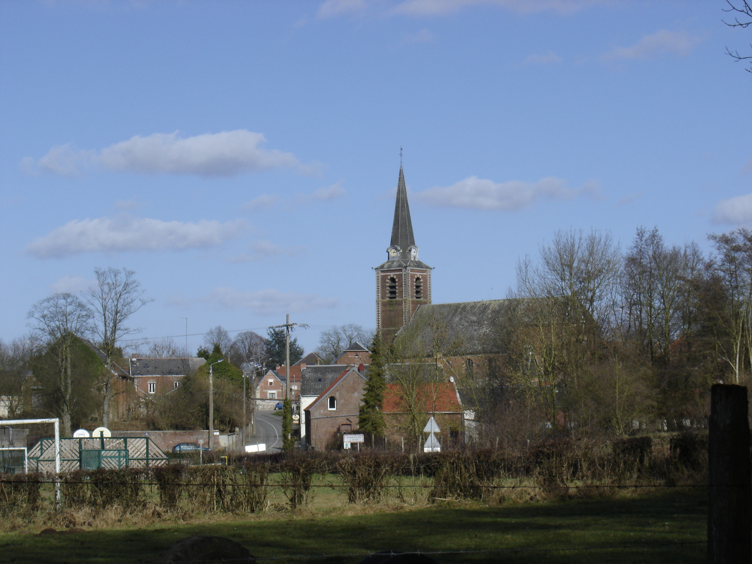 Église de Vendegies-au-Bois